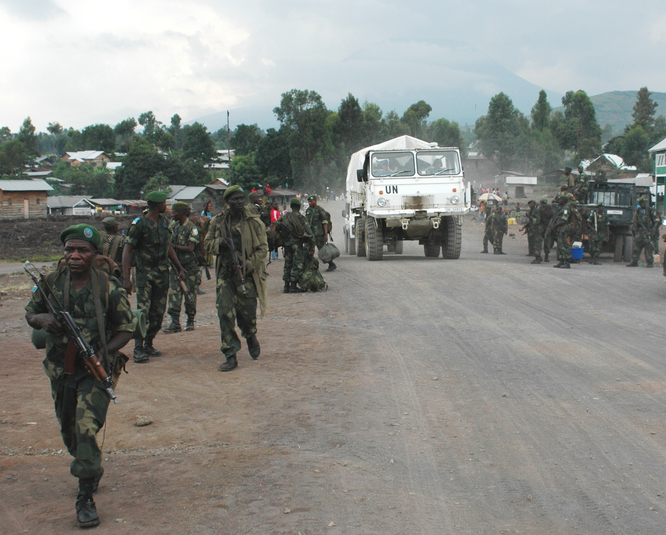 Les FARDC et la MONUSCO renforcent leur présence à l'intérieur de Goma et ses environnants suite à un deuxième jour (21 mai 2013) de combats entre le M23 et les forces nationales de défense. © MONUSCO/Clara Padovan